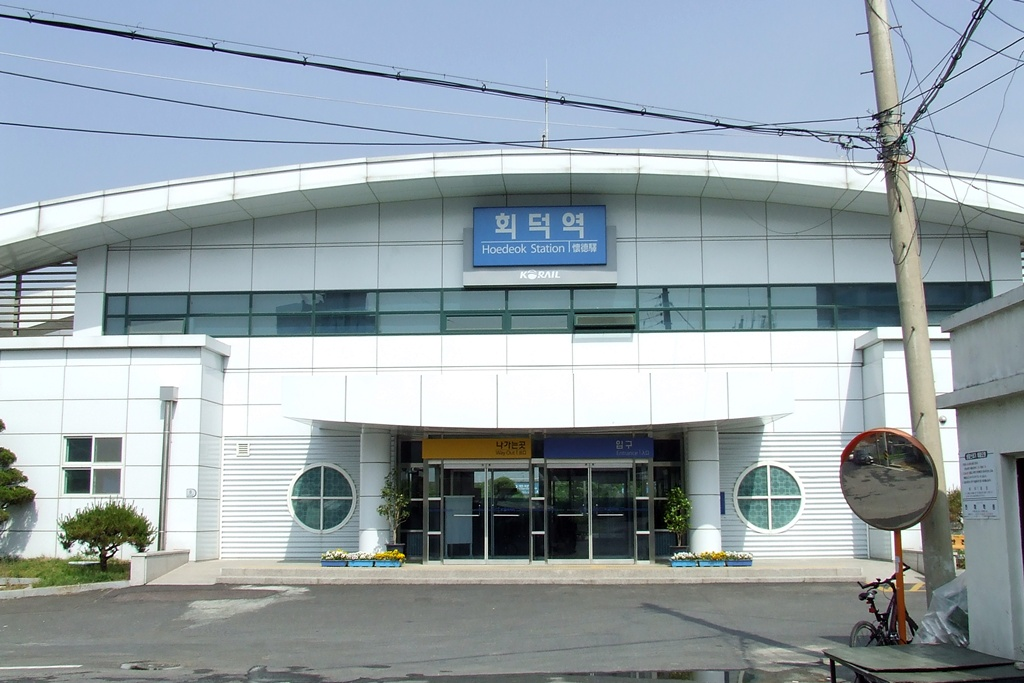 京釜線懐徳駅